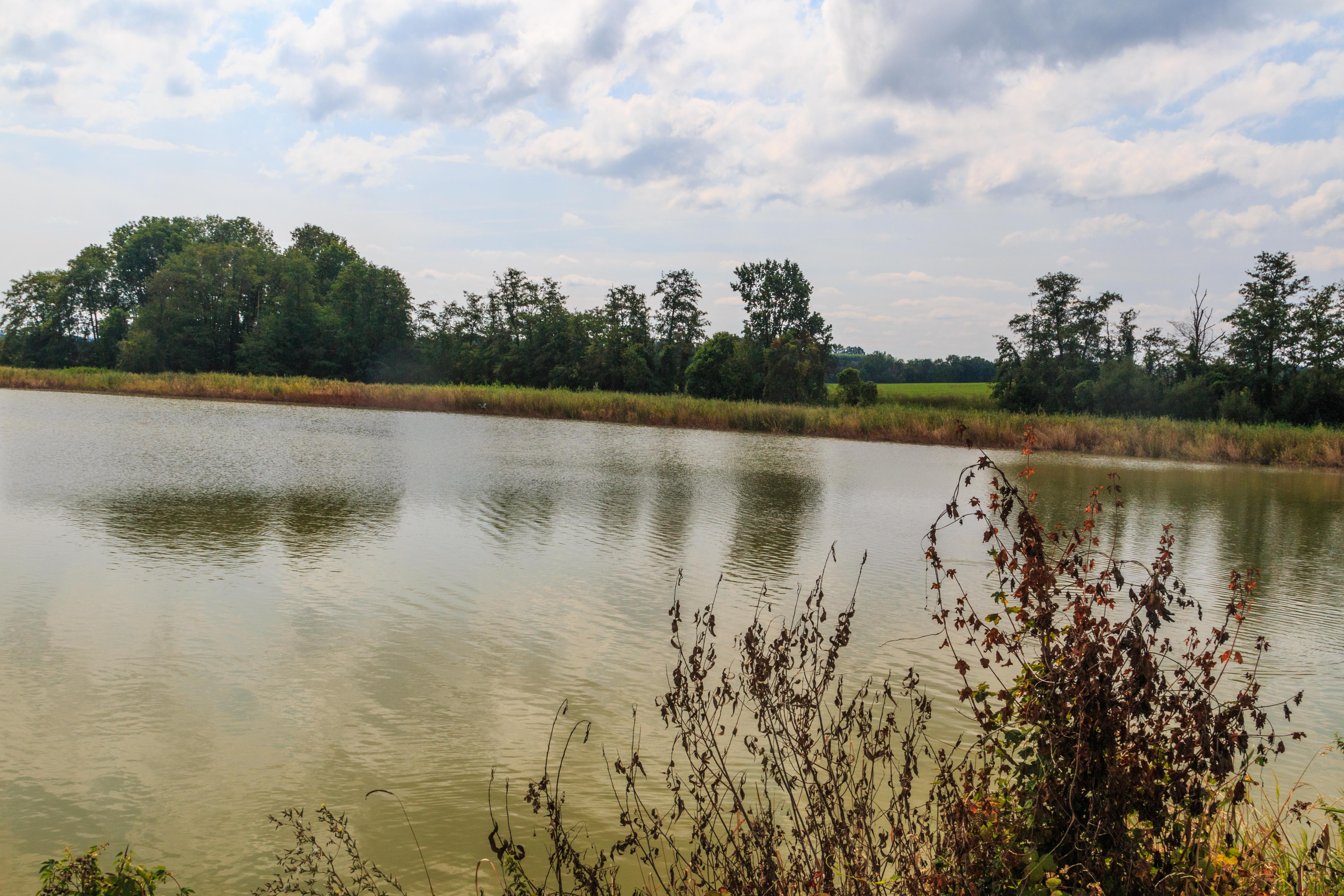 Dolní Heřmanický rybník